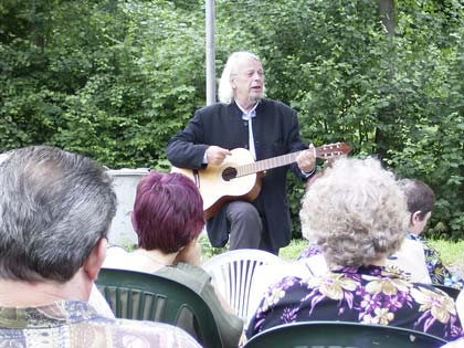 Písničkář, duchovní a politik Svatopluk Karásek. Pořízeno v červnu 2003 v Růžďce při ekumenickém setkání u pomníčku.